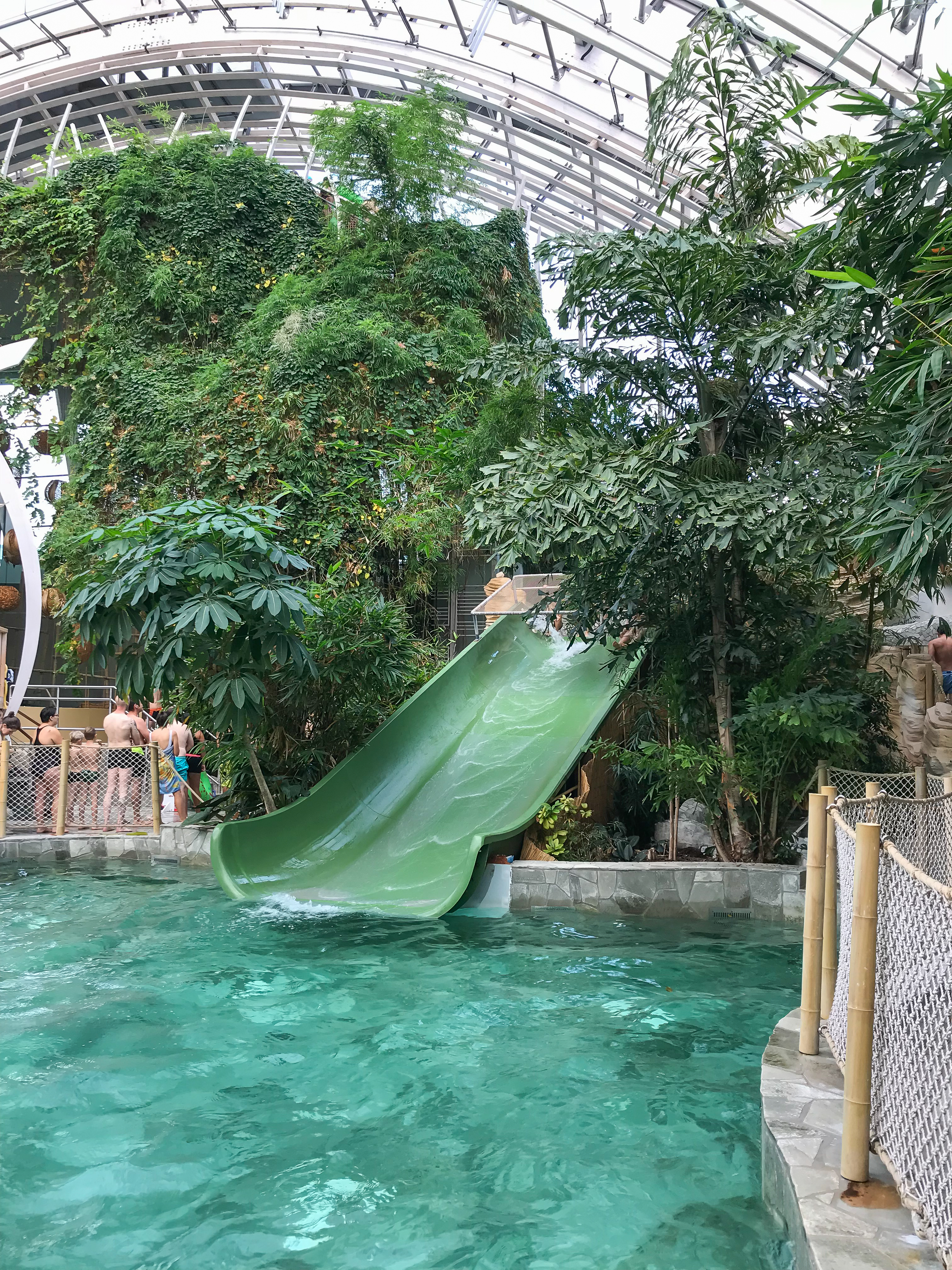 Vue de l'intérieur de l'Aqua Mondo du domaine "Les Trois Forêts" de Center Parcs